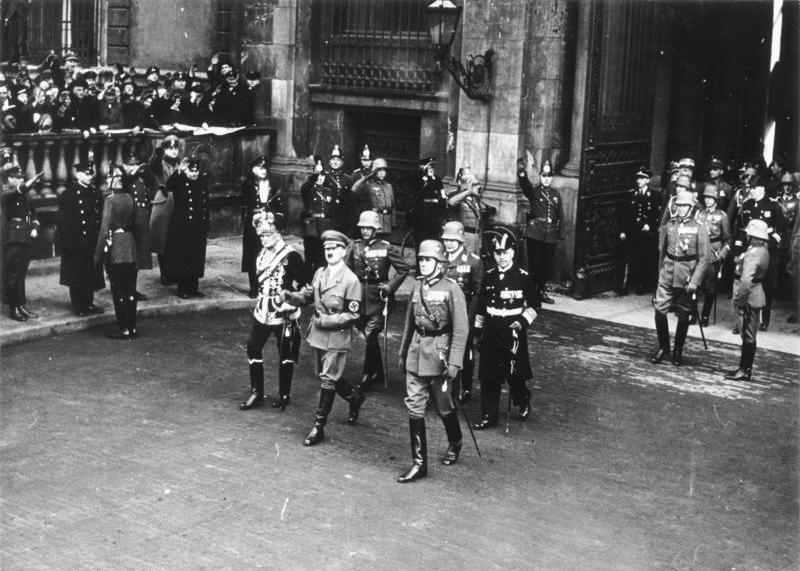 Heldengedenktag in Berlin 1935. v.lks. Mackensen, Hitler, Blomberg beim Verlassen d[er] Staatsoper nach der Gedenkfeier durch Reichskriegsminister v. Blomberg. [2. Reihe v.l.: von Fritsch, Göring, Raeder]